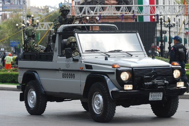 trasporte de tropas